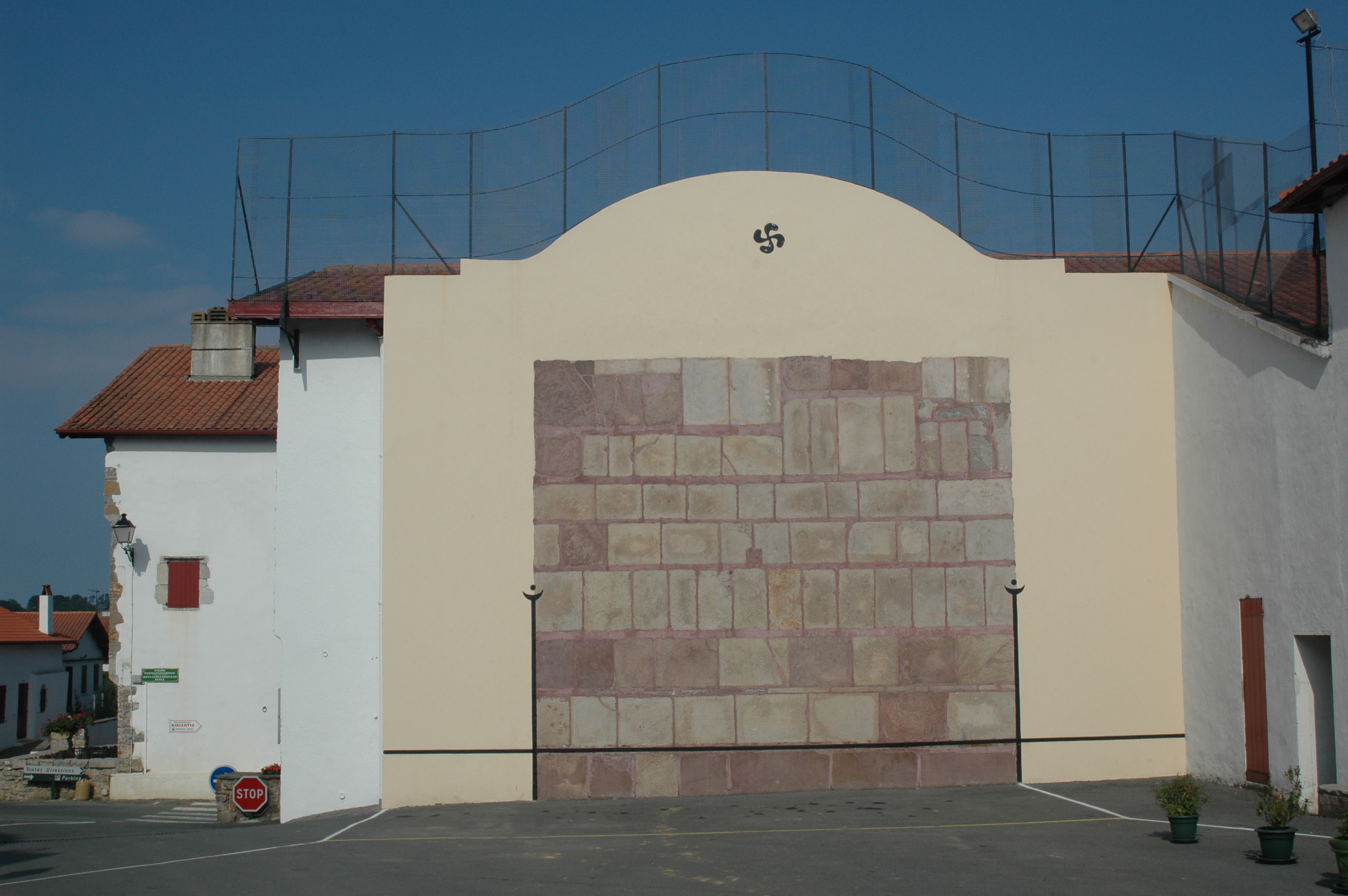 Ahetze, le fronton. Photo prise le 23/07/06 par Harrieta171